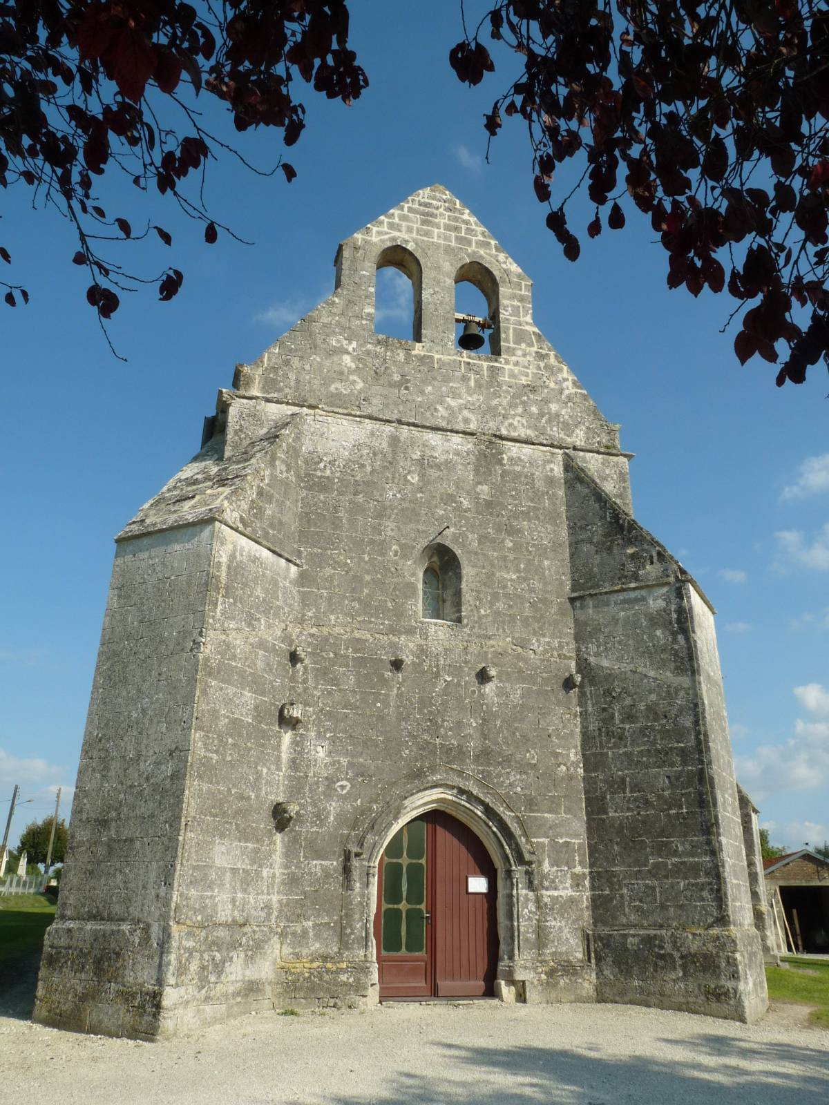 église de St-Médard près Barbezieux (16), France